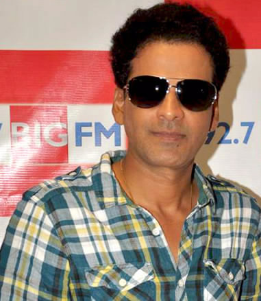 Manoj Bajpayee promoting Arakshan at 92.7 BIG FM